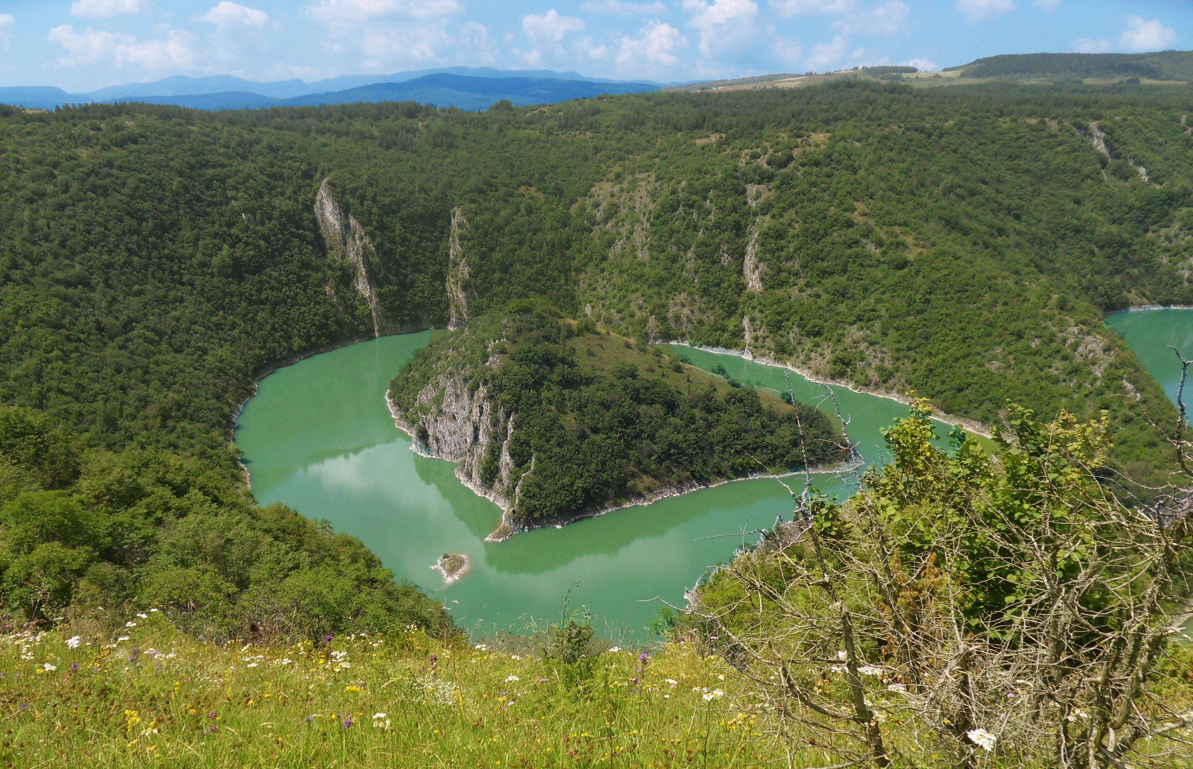 Za romantičare, ostrvo u obliku srca u srcu kanjona reke Uvac